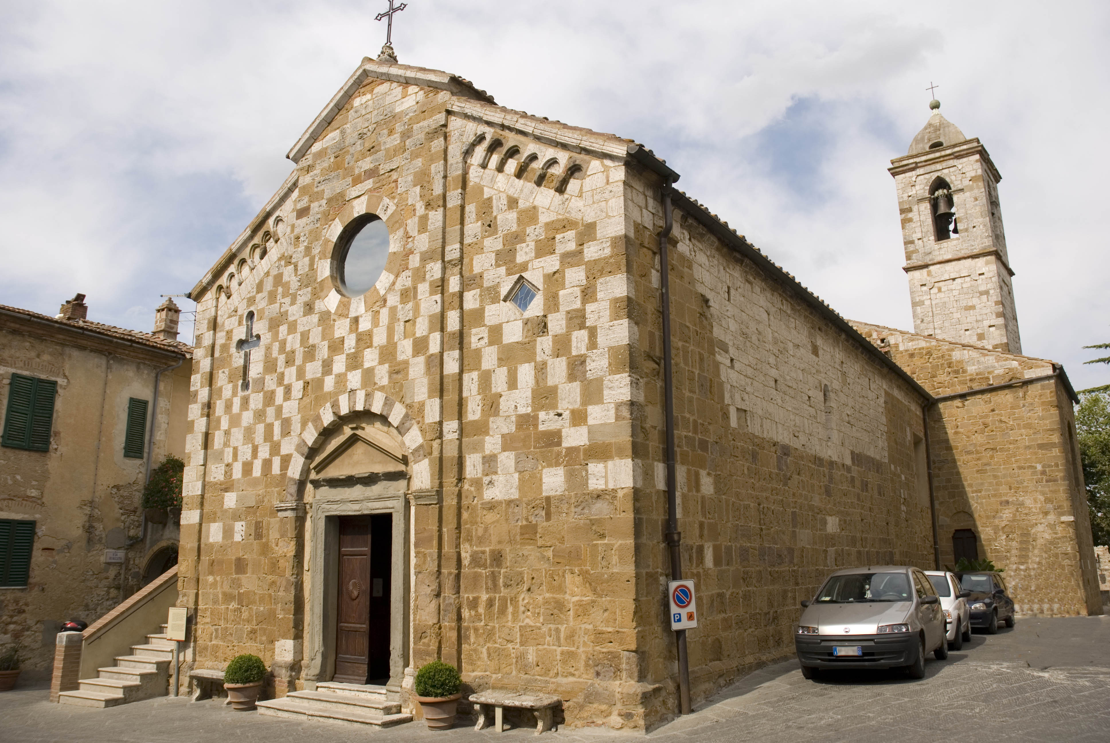 see title